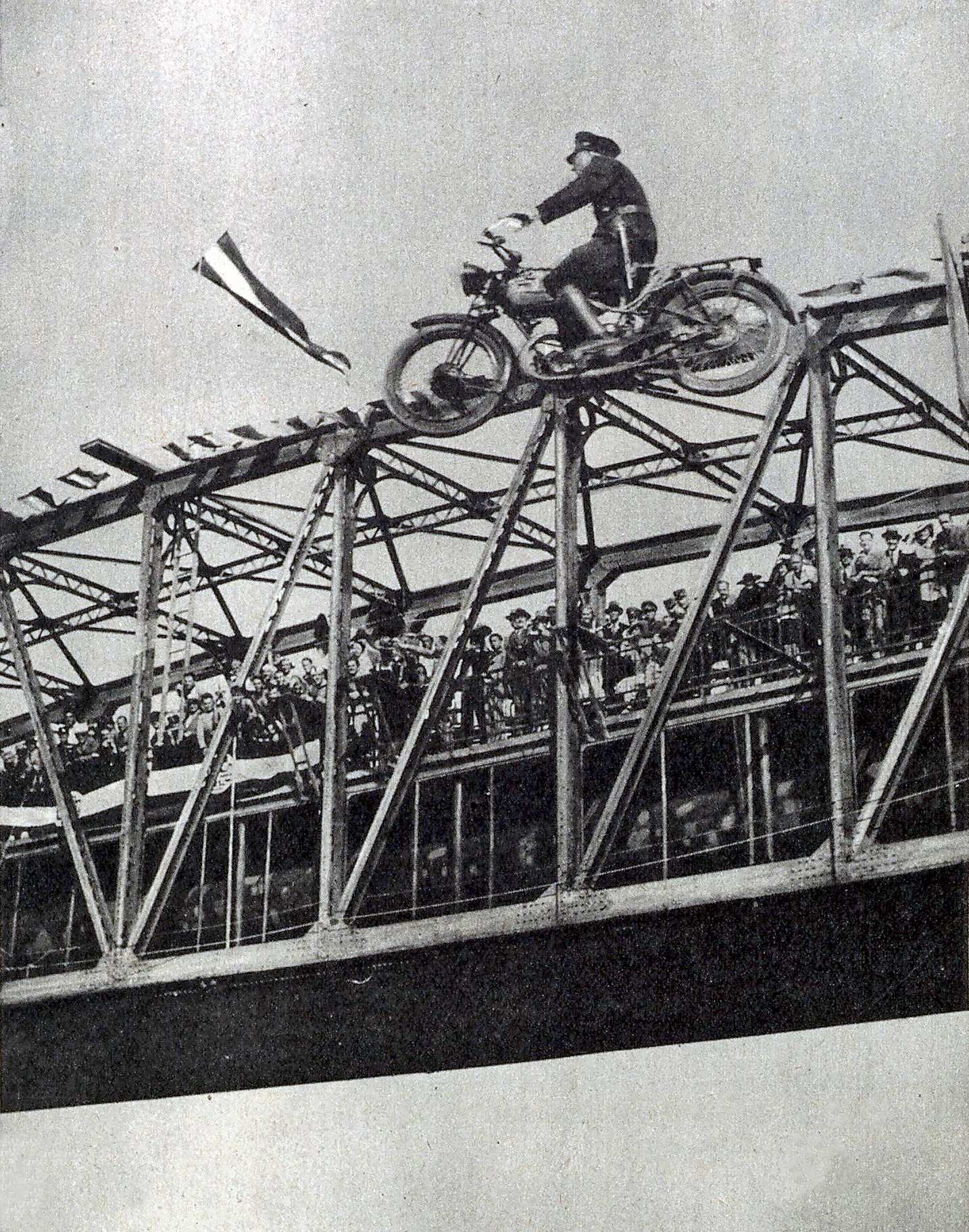 Wien-Erdberg, Gaswerksteg als Tribüne bei der 15. Österreichischen Zillenmeisterschaft